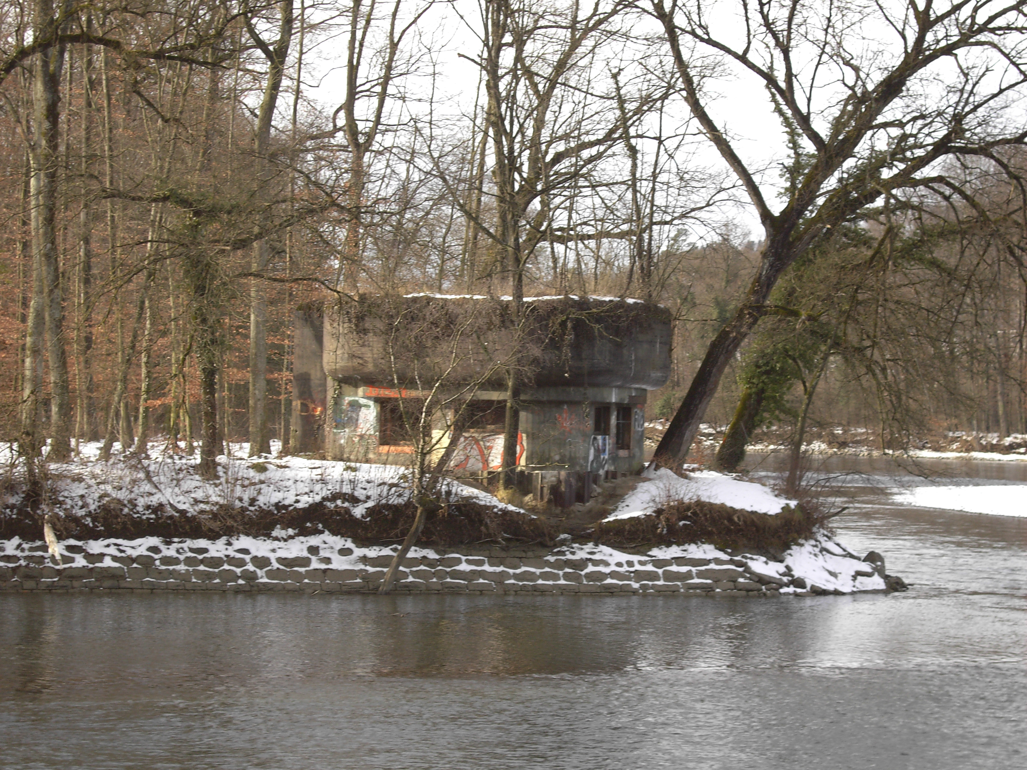 Bunker aus der Zeit des zweiten Weltkriegs zur Sicherung der Limmatstellung (am Zusammenfluss von Aare und Reuss in der Schweiz)